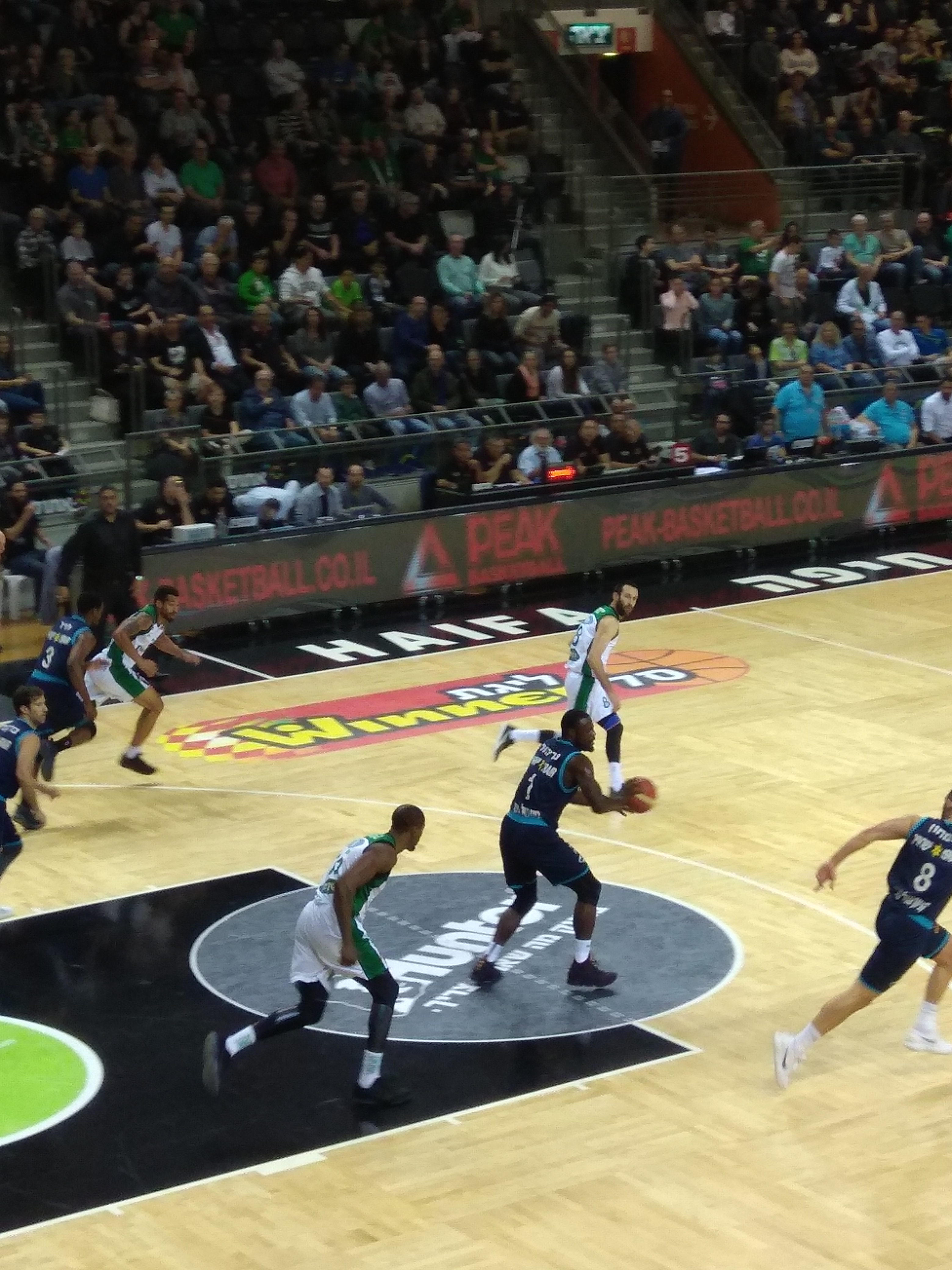 מכבי חיפה בירוק-לבן, 2018